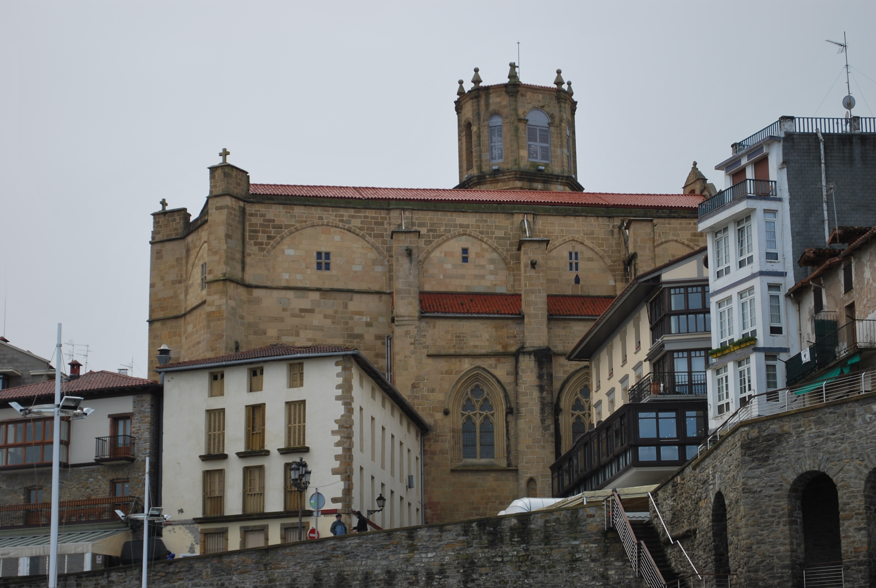 Église San Salvador depuis le port de Getaria (Guipuscoa).